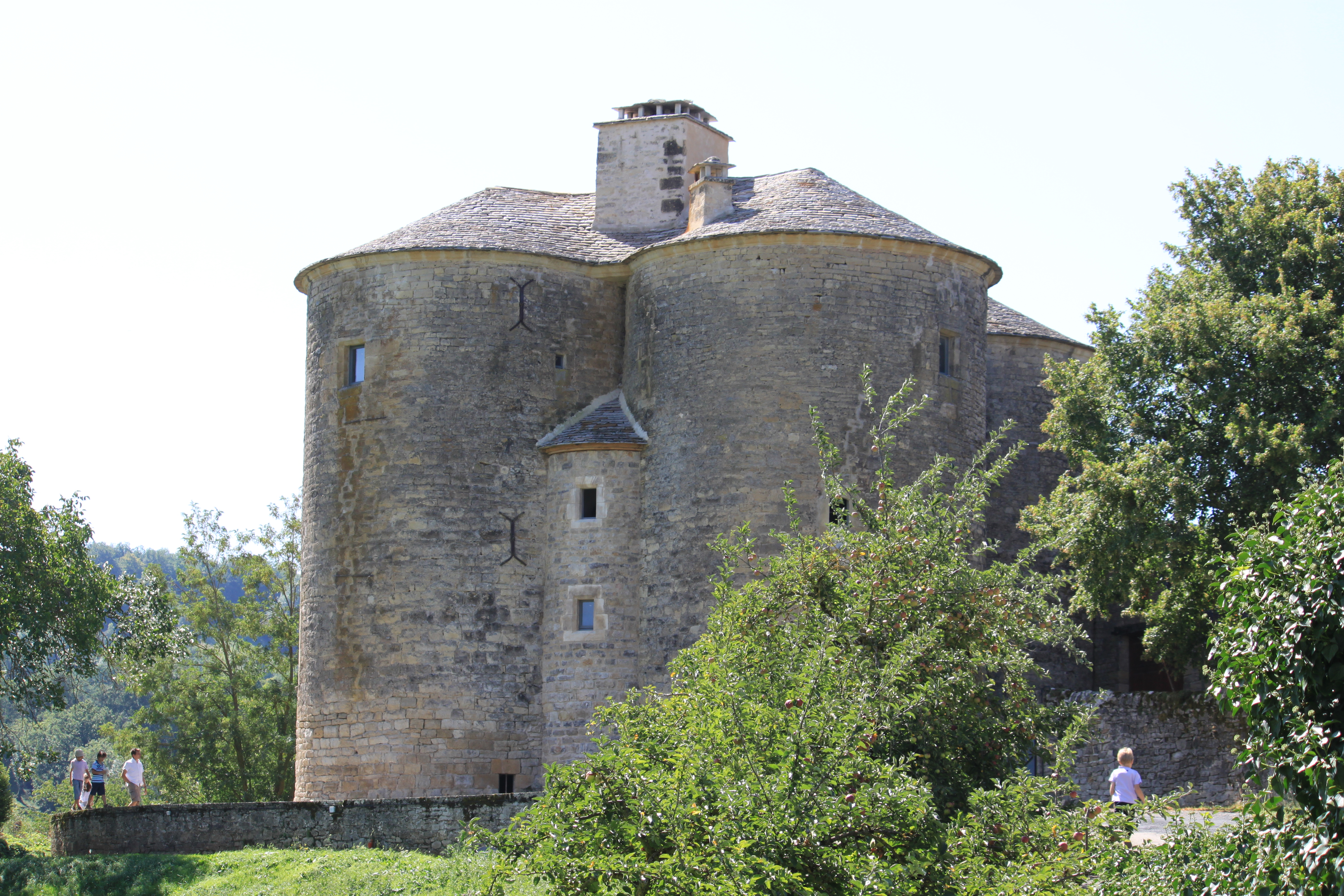 Château de Cruéjouls, Cruéjouls, Aveyron, France